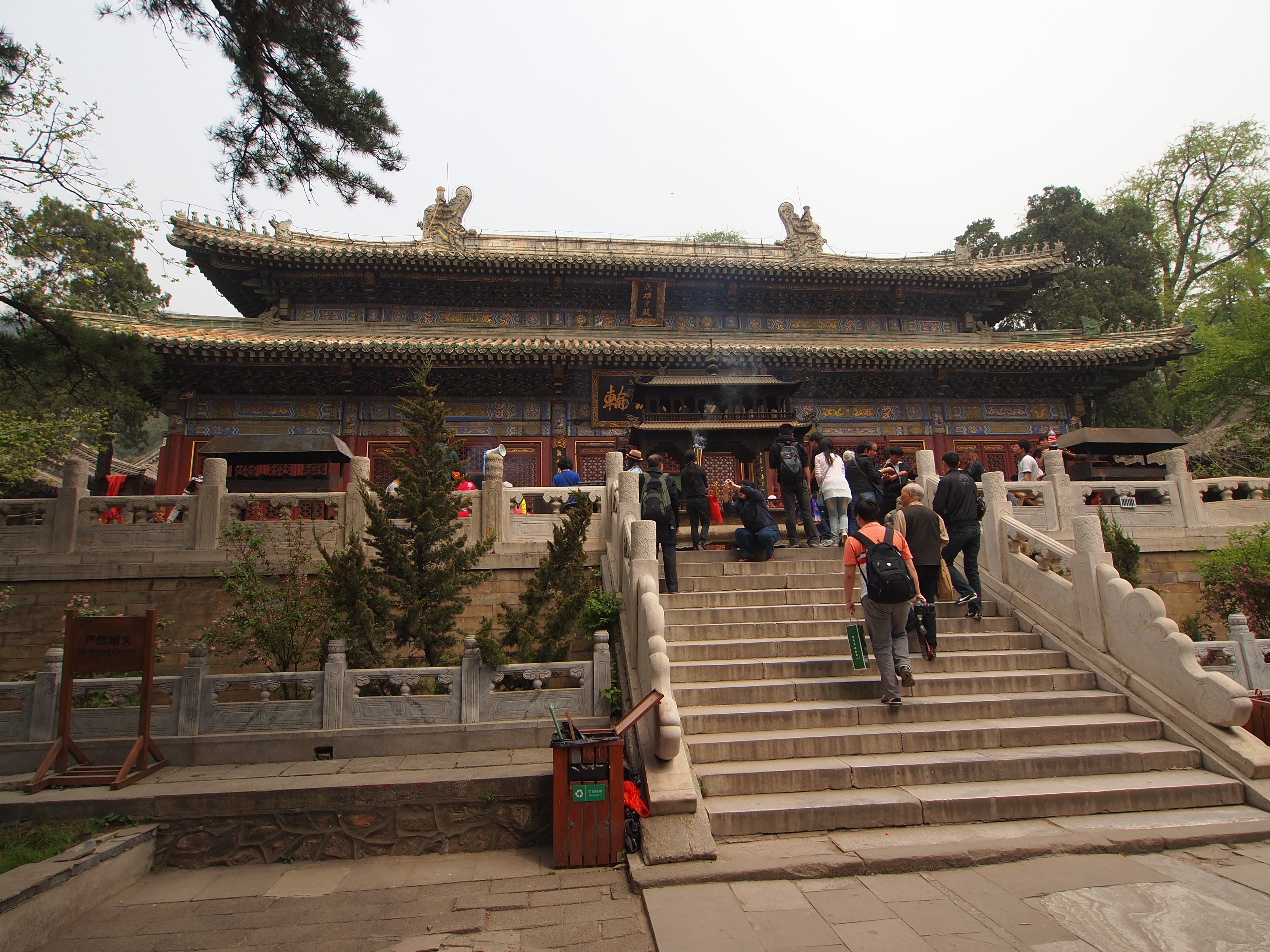 潭柘寺大雄宝殿 - Sakyamuni Hall - 2012.04